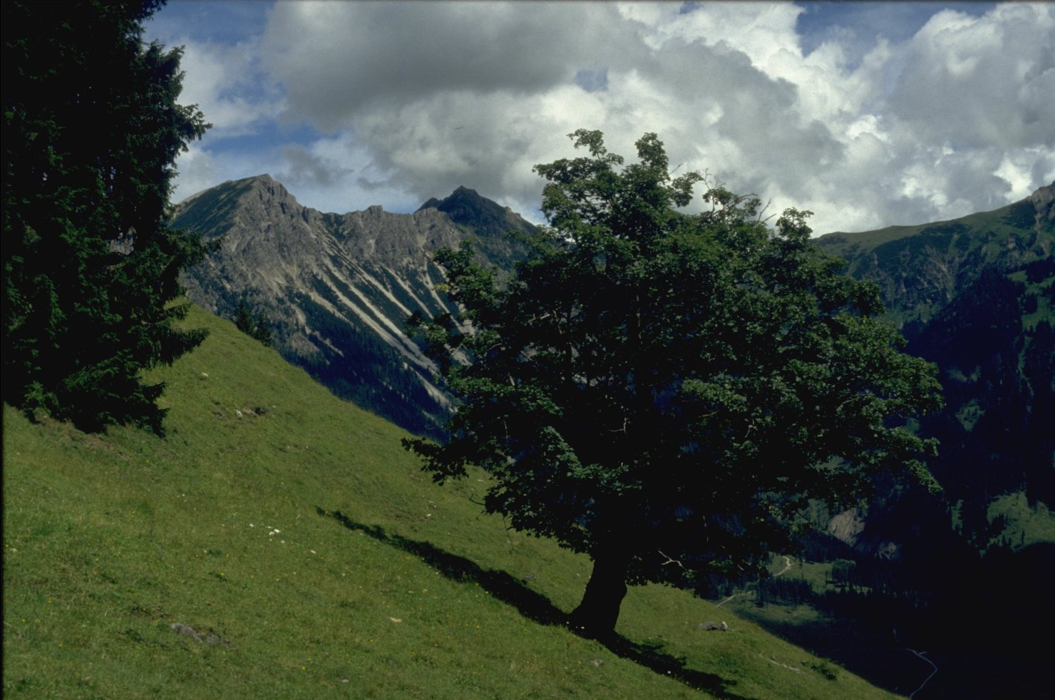 Bschießer und Ponten von Westen